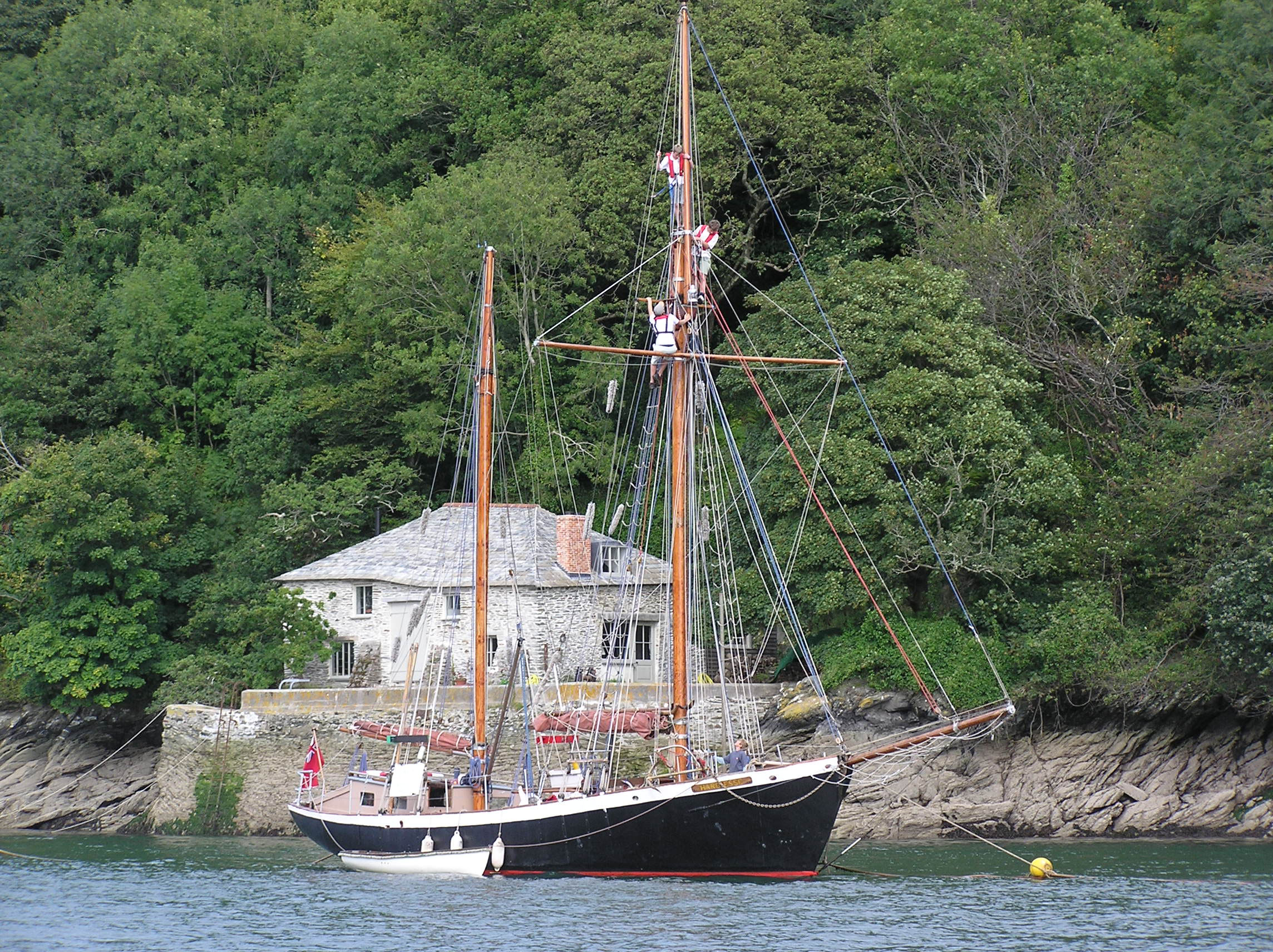 Description : Ketch à gréément aurique à Fowey Lieu : Fowey, Royaume Uni Date : 2005 Auteur : Pline photo personnelle The place is called Prime Cellars and the boat is called Hespar.